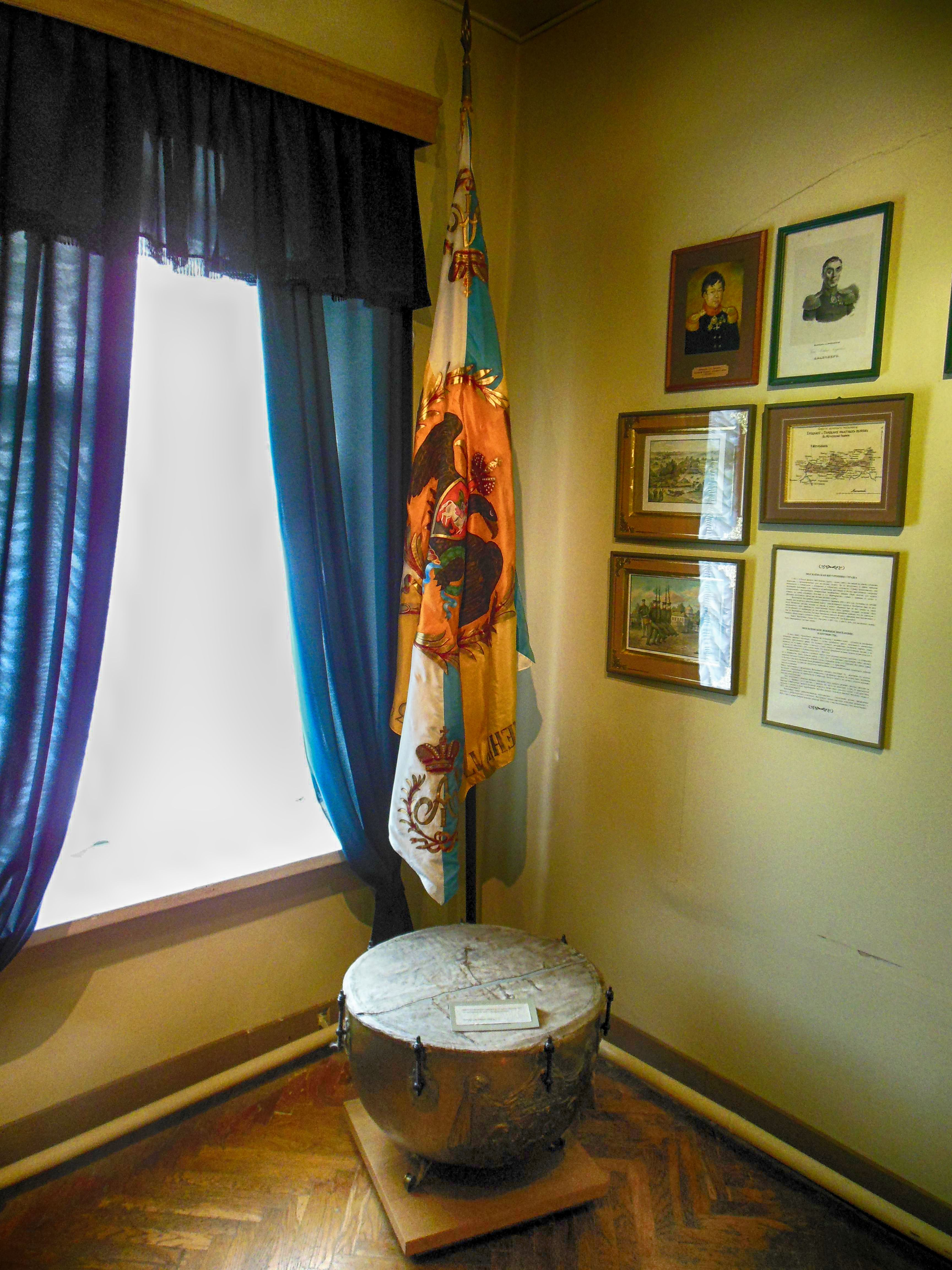 Беларуская (тарашкевіца): Магілеўскі музэй этнаграфіі, экспазыцыя -Губернскі Магілеў